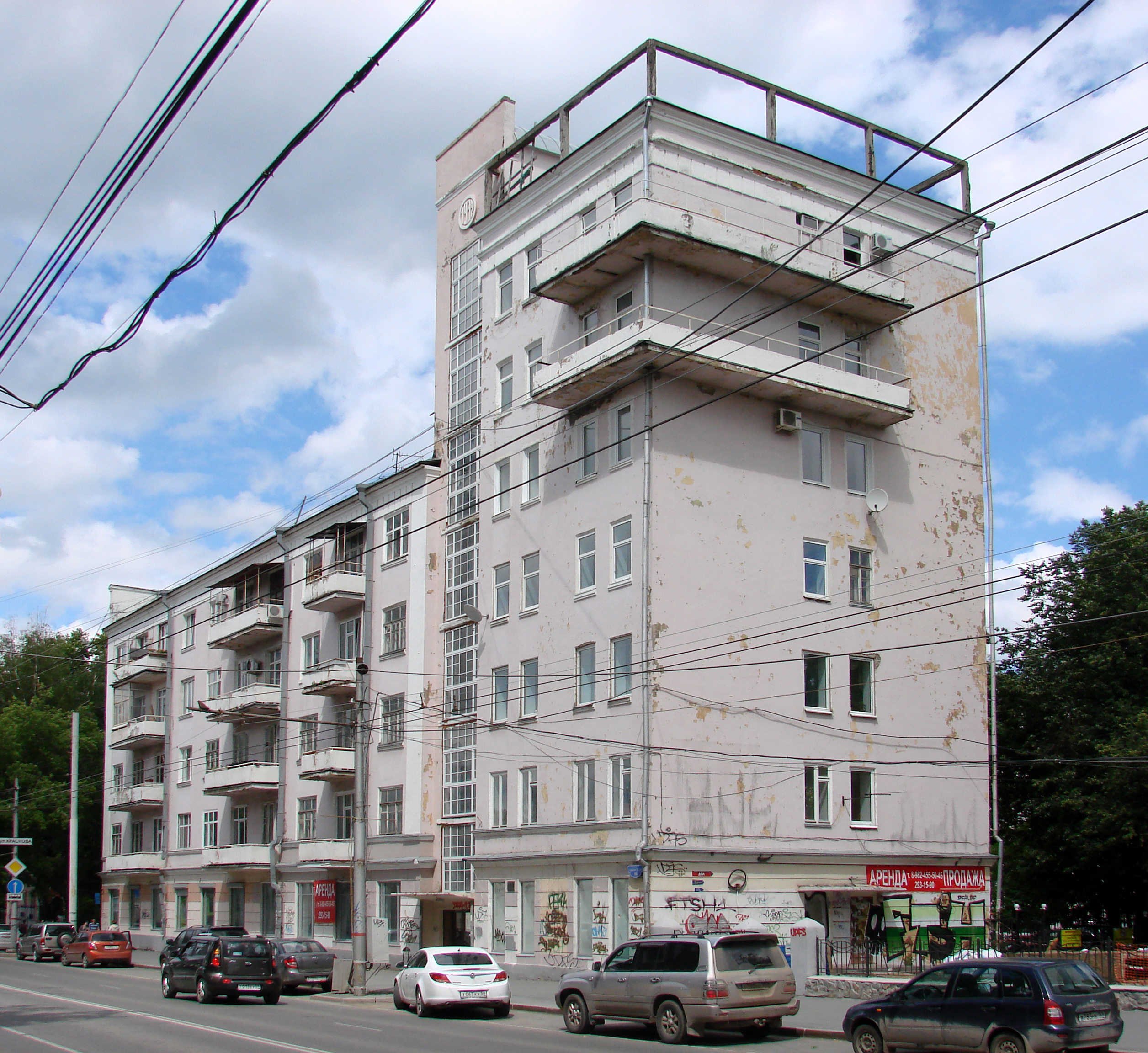 Жилой дом ("дом чекиста") - 1929 г. Пермь, улица Сибирская, 30